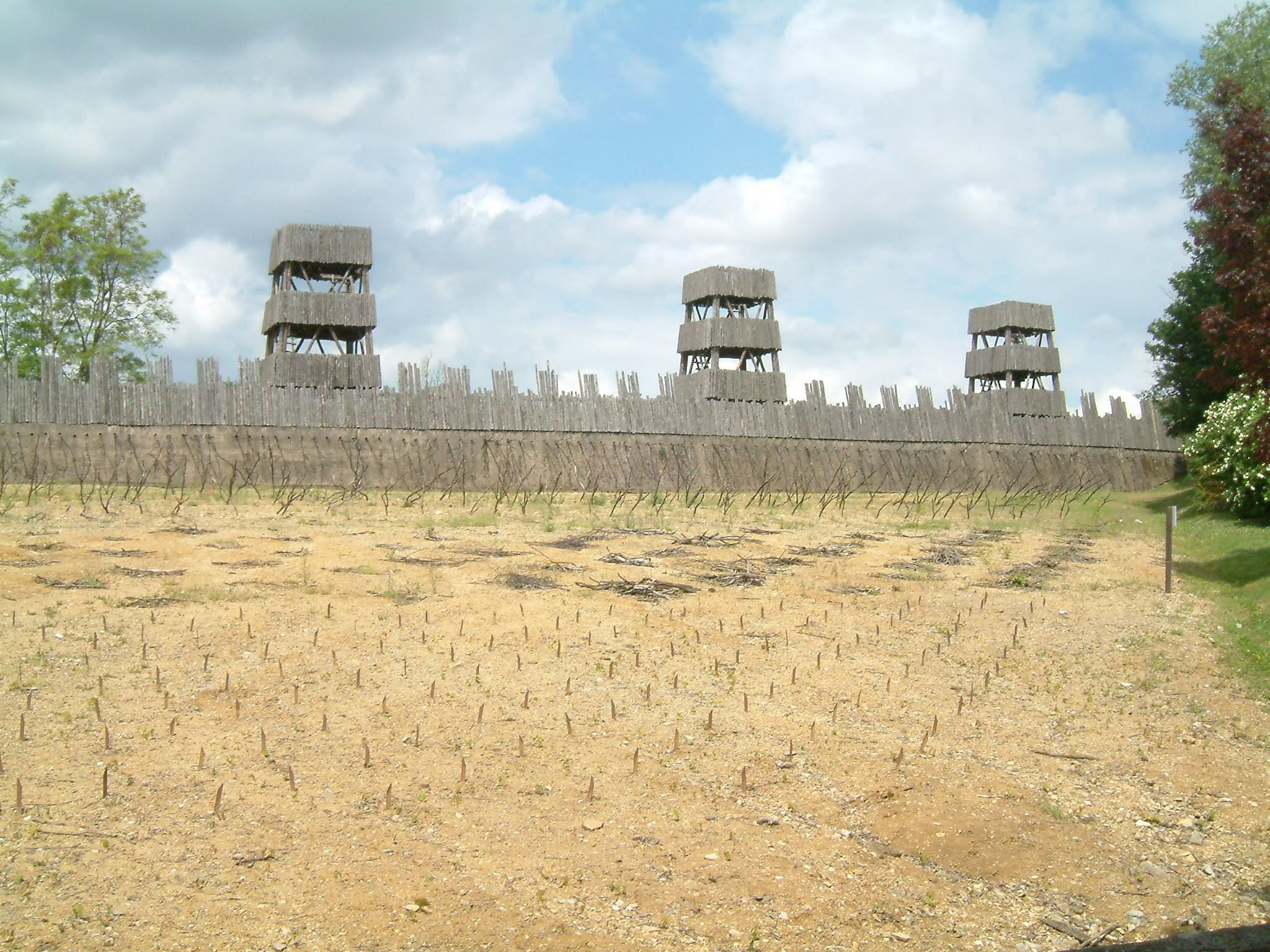 Réplique des fortifications utilisée lors du siège d'Alésia, Archéodrome de Beaune, Merceuil, Bourgogne, FRANCE.